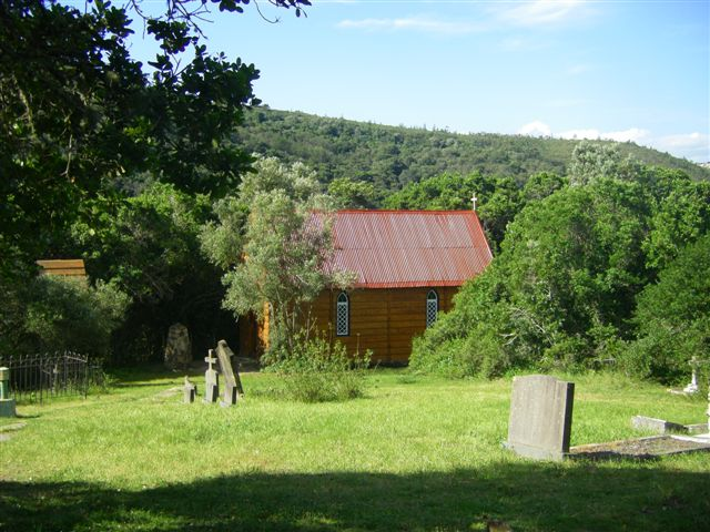 StAndrewskerk Plettenbergbaai Suid-Afrika